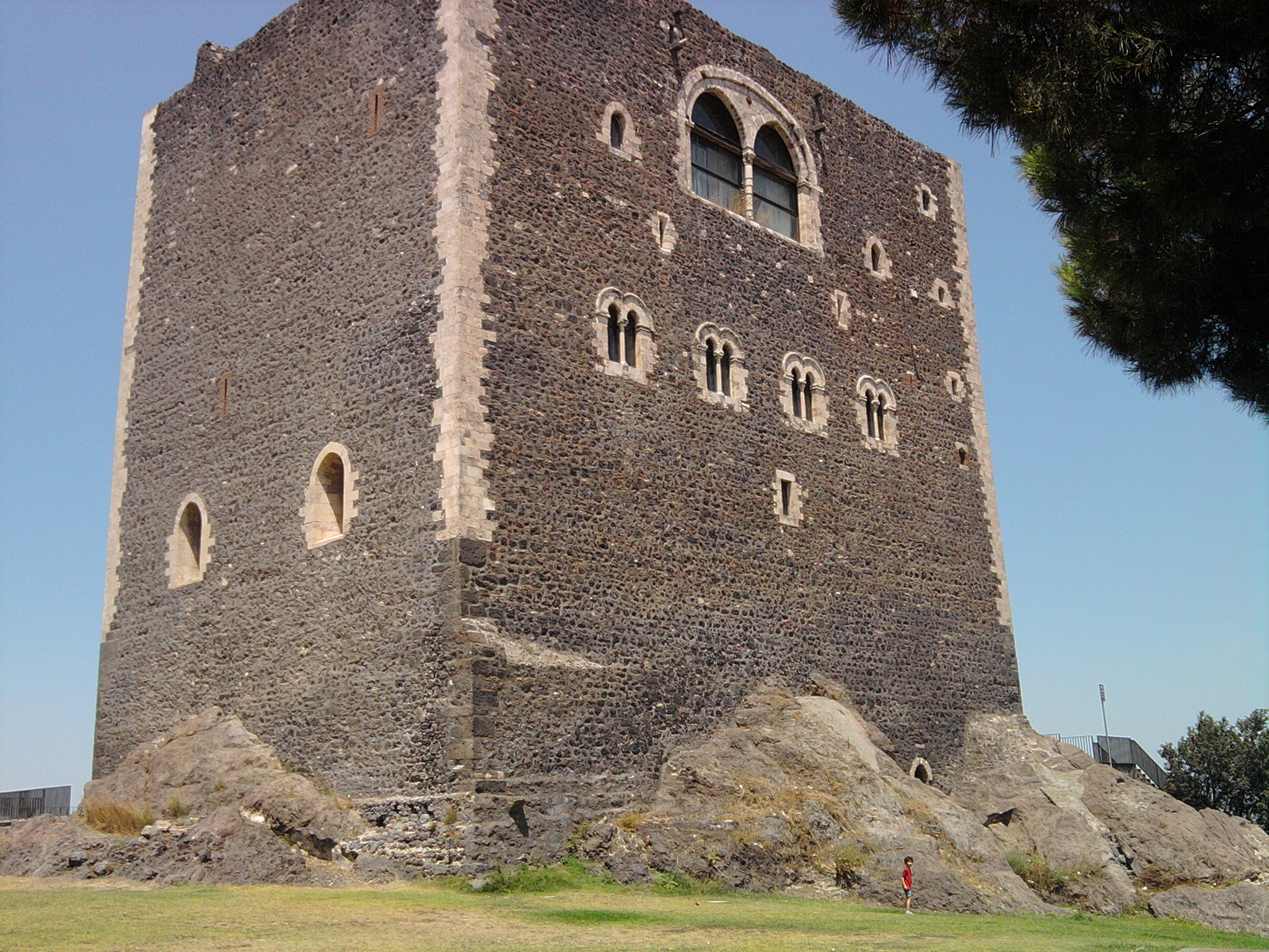 Veduta del Castello Normanno